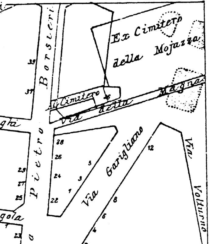 Milano, la Mojazza